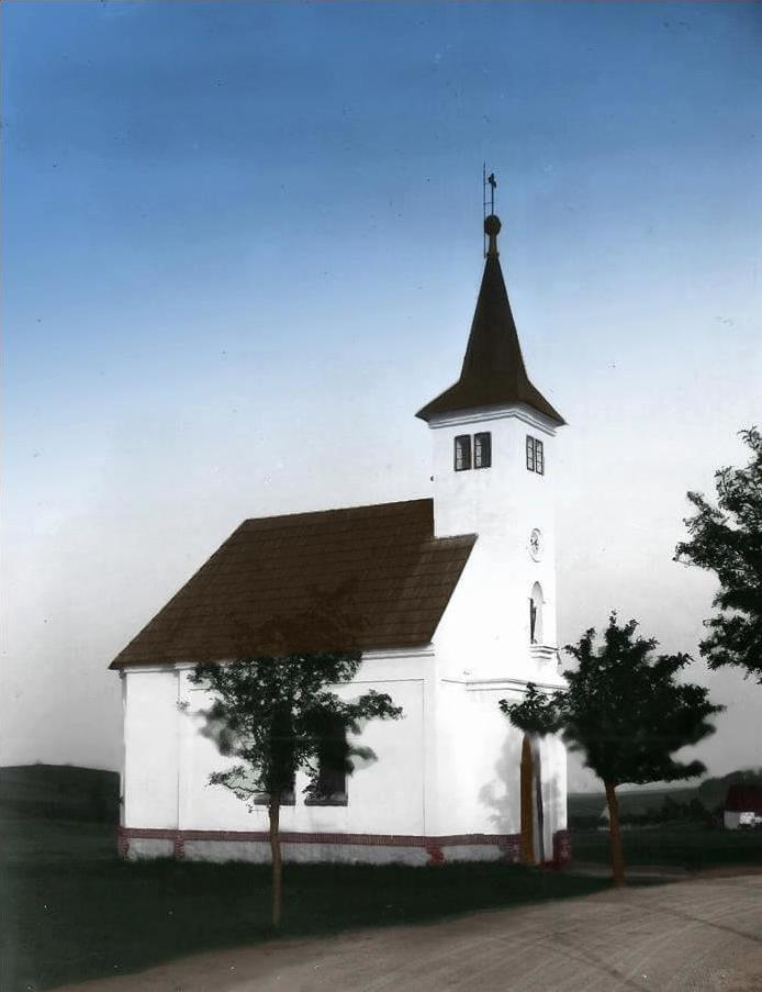 Kaple Navštívení Panny Mariev Předním Cínovci